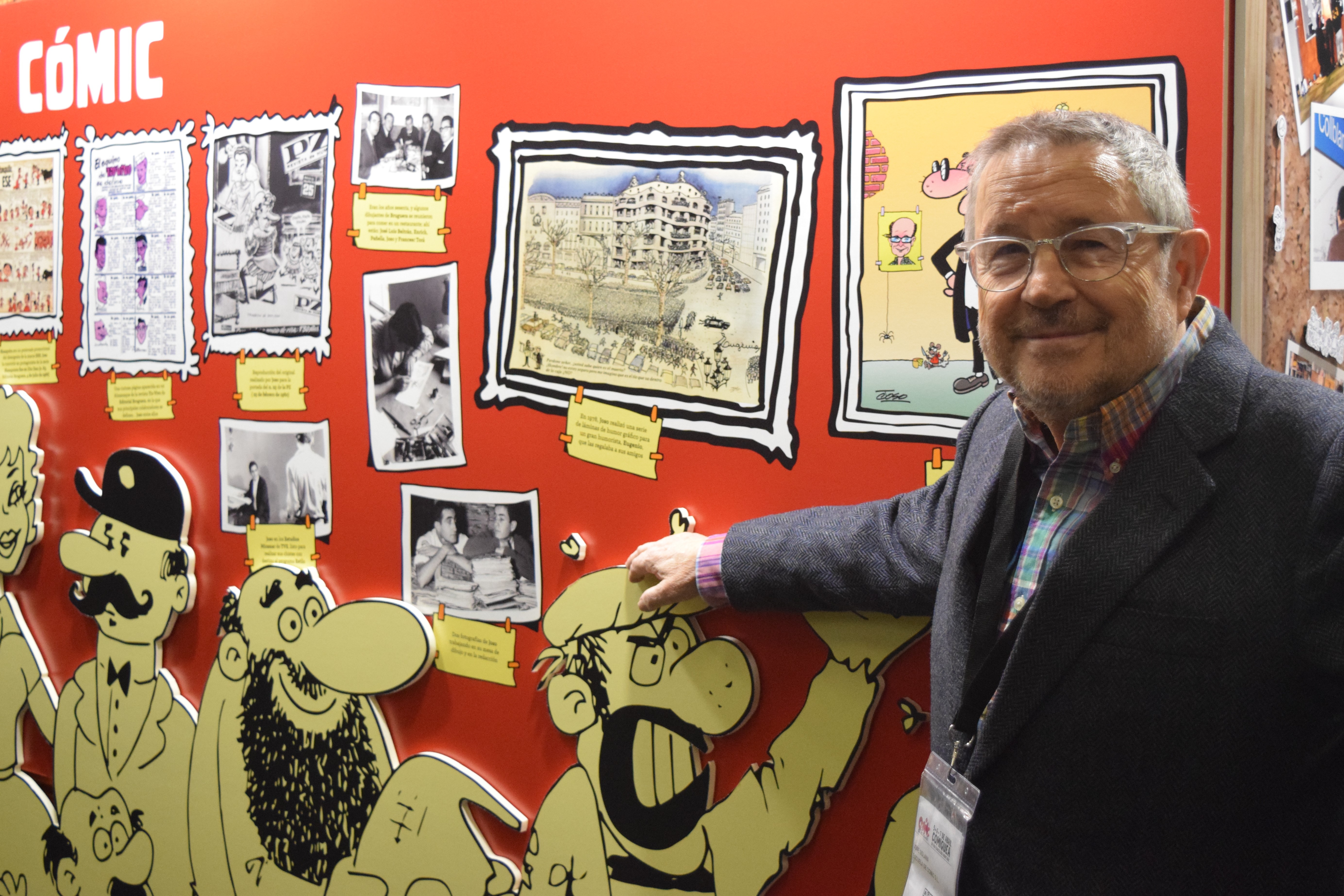 Josep Solana "Joso" mostra l'exposició dedicada a ell: Exposició "Joso, The expo". Exposició en homenatge al 80è aniversari de l'humorista gràfic Josep Solana, conegut per Joso. 37 Comic Barcelona, 2019.